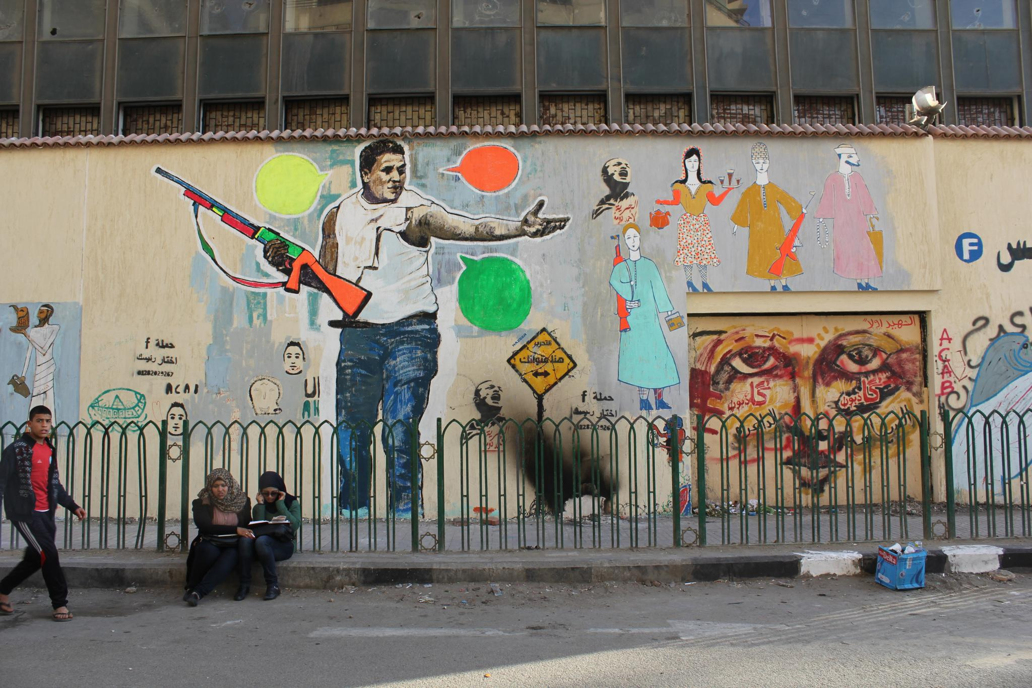 غرافيتي على جدار الجامعة الأمريكية في مدخل شارع محمد محمود، مستوحى من صورة سامبو، صممه و نفّذه عمّار أبو بكر و هنا الديغم.